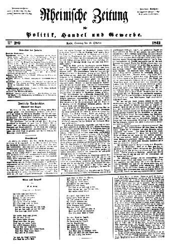 Rheinische Zeitung für Politik, Handel und Gewerbe / Rhenish Newspaper